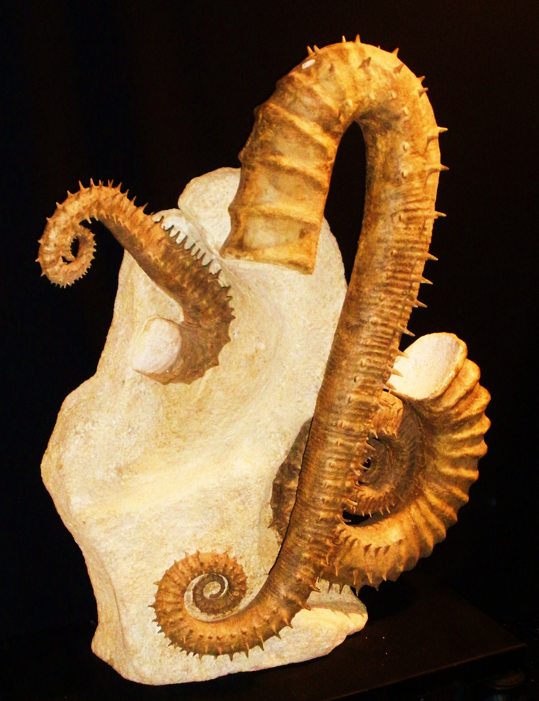 Fossil of ammonites, extinct molluscs- Took the photo at Fossil Show, Munchen 2011